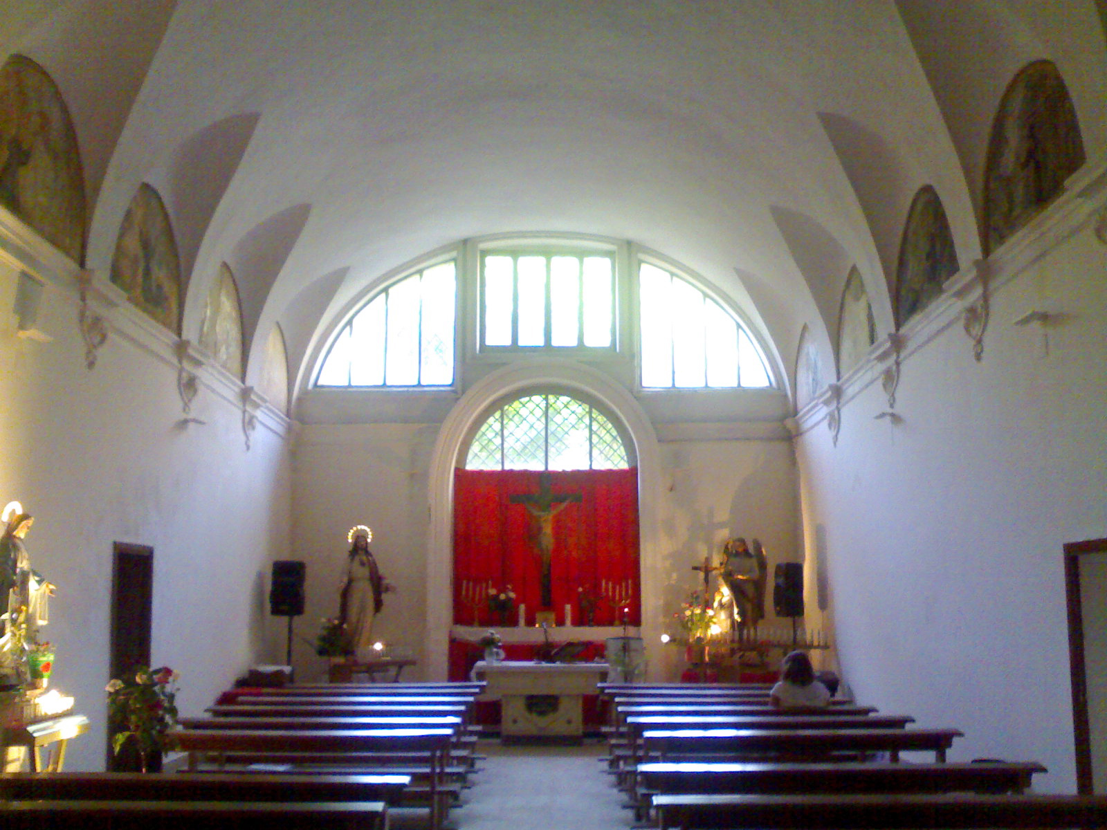 Sagrestia allestita come chiesa temporanea, prima dei restauri di Santa Maria della Verità (Napoli)